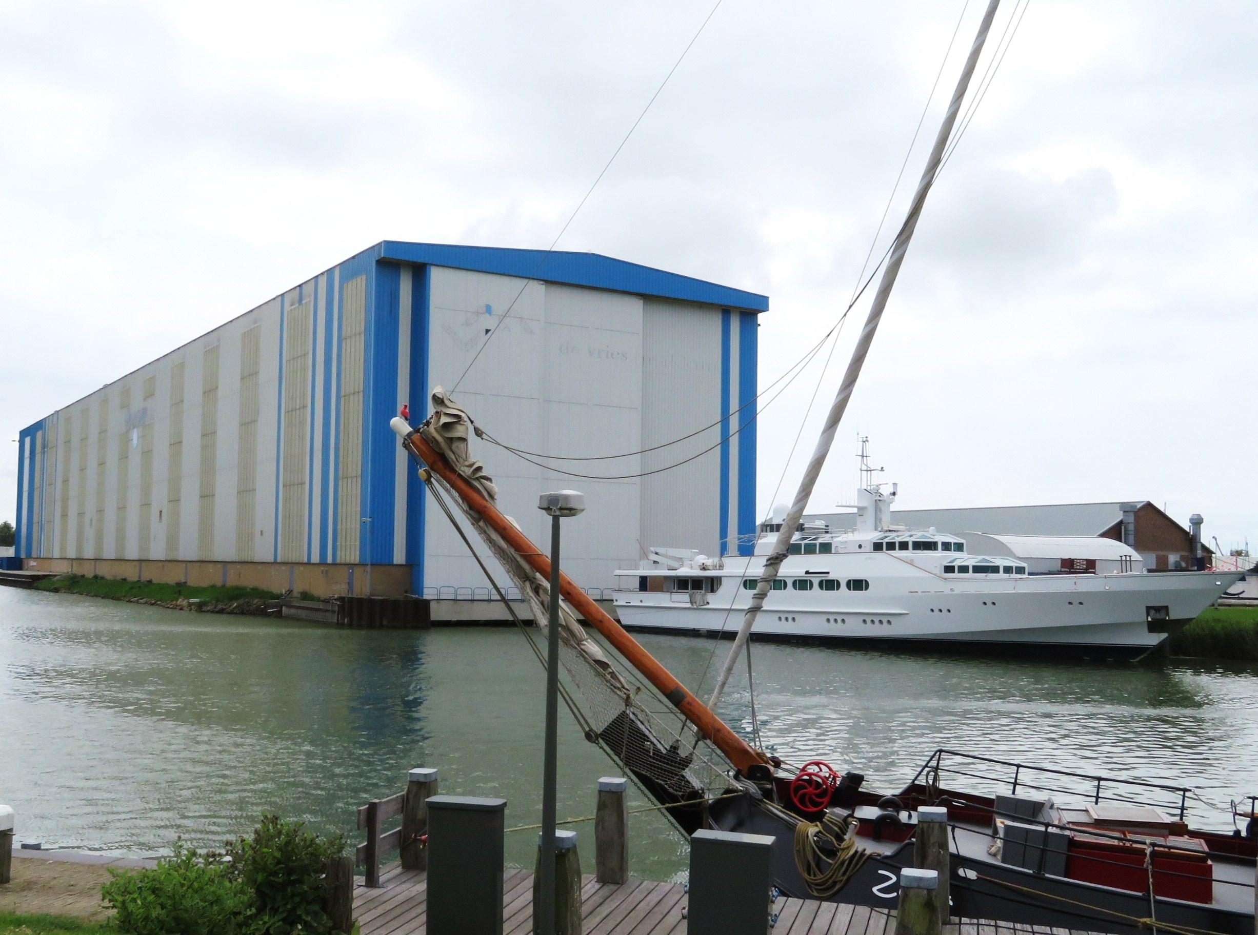 Werf van Feadship aan het Makkumerdiep te Makkum